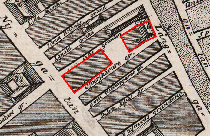 Del av Brolins karta över Gamla stan 1771 visande kvarteren Pomona större och mindre samt Gåstorget